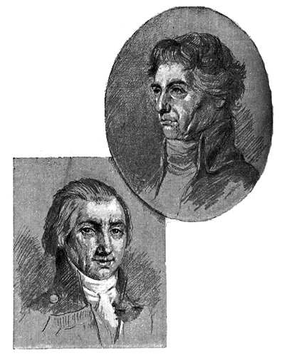 Ilustración del episodio nacional Cádiz de Benito Pérez Galdós. Edición de La Guirnalda y Episodios Nacionales, 1882, pp.5-157. Ilustraciones de Enrique y Arturo Mélida.